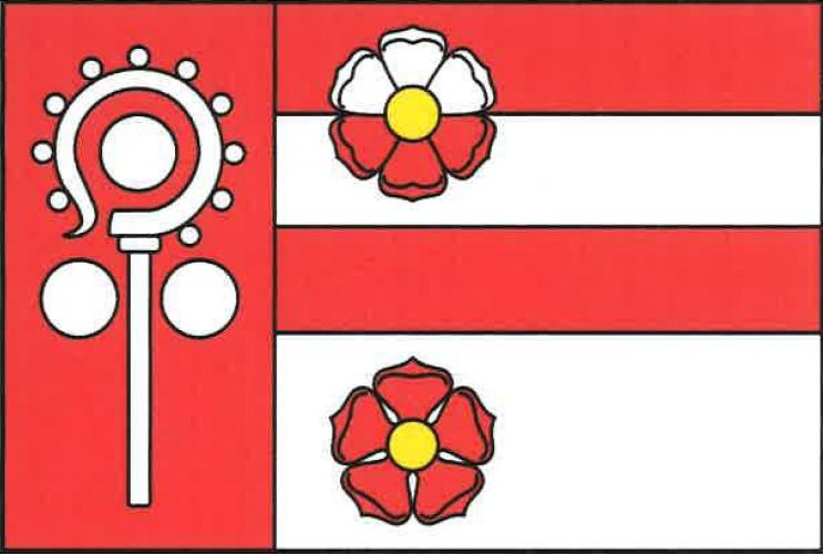 Čečovice vlajka